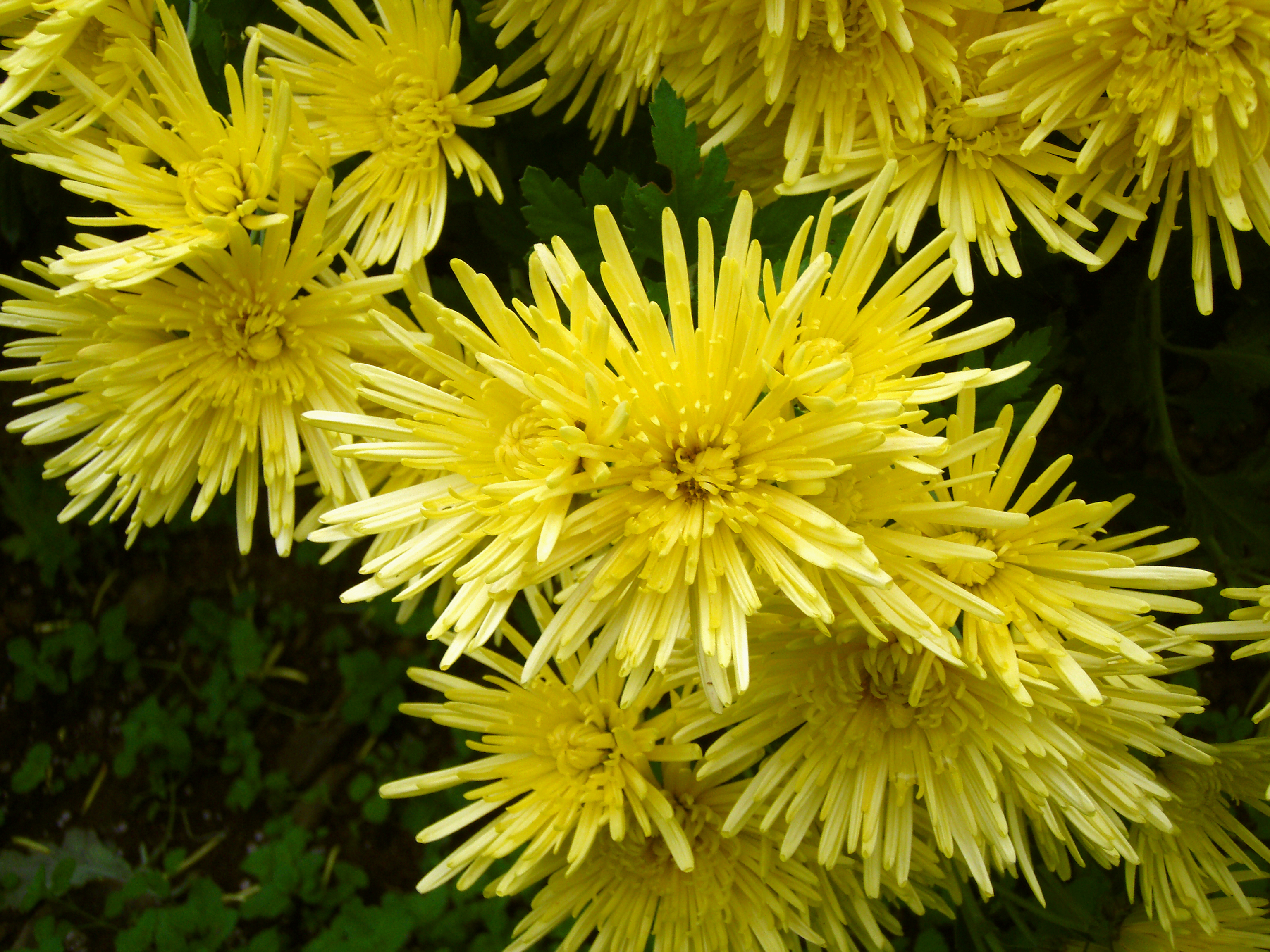 食用キク(黄色品種)